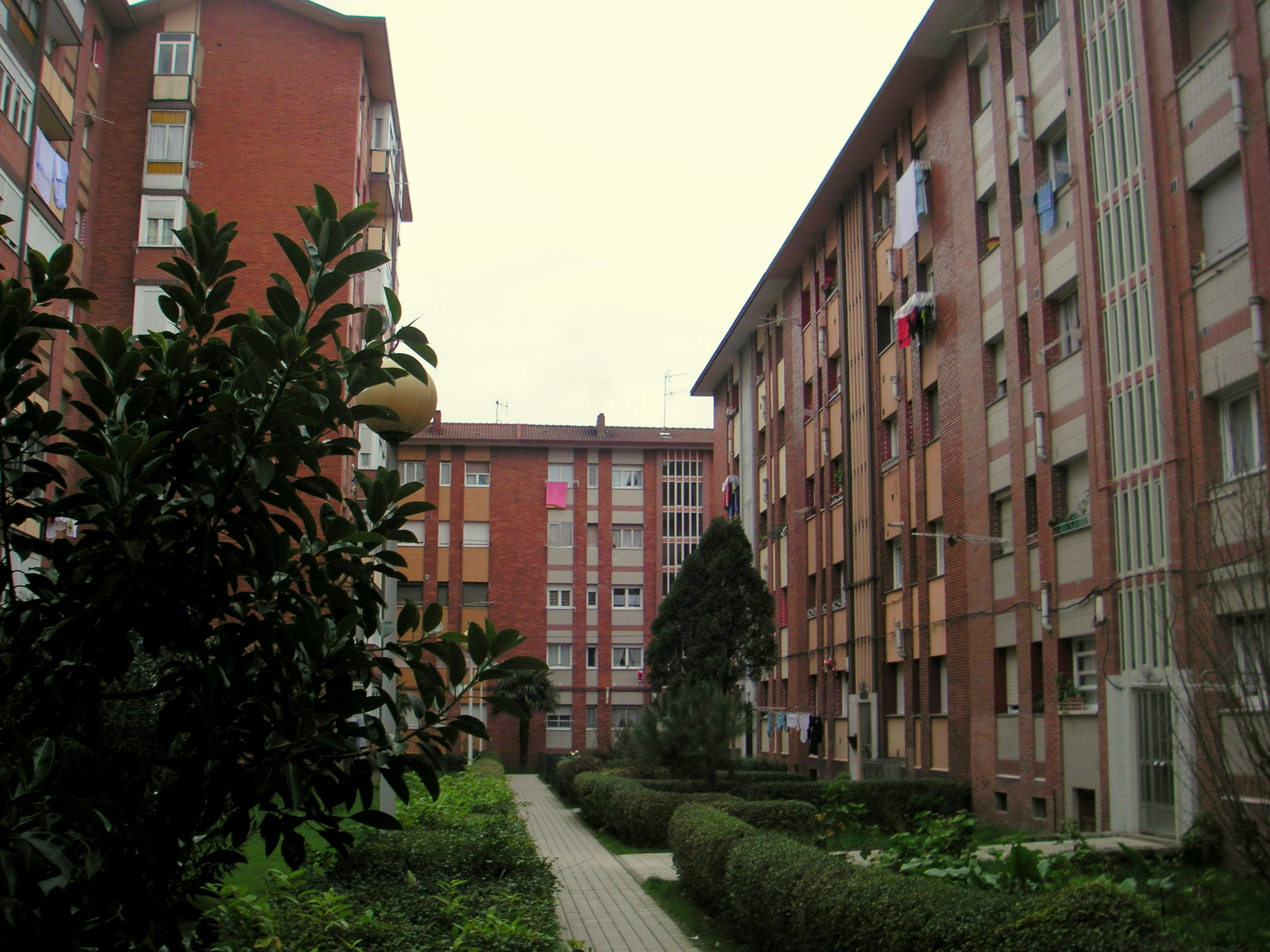 Bloques de viviendas pertenecientes al grupo conocido como CARSA (Construcciones Ángel Rodríguez, S.A.), en el barrio de Pumarín, en Gijón (España).